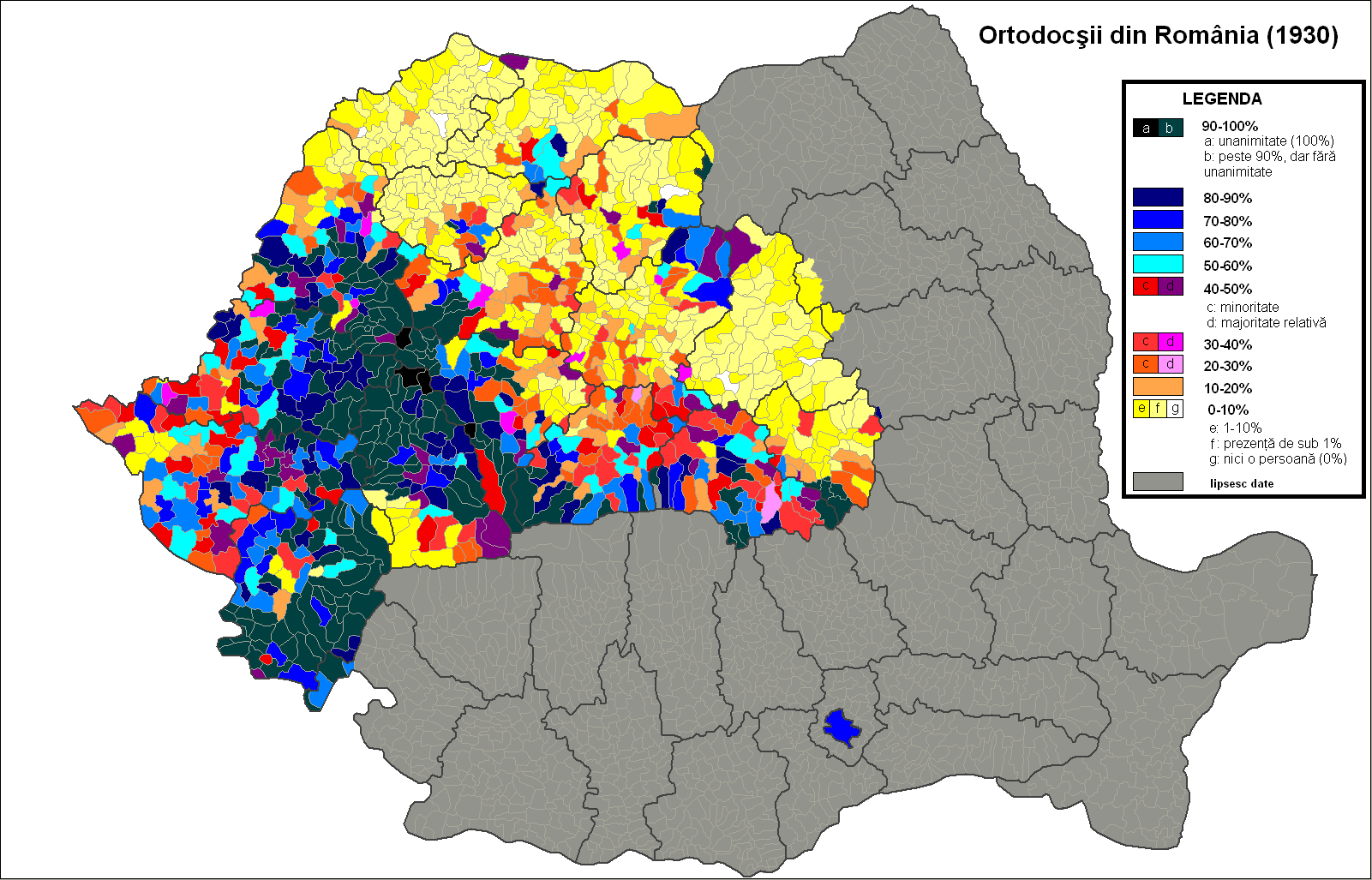 Distibuţia ortodocşilor în România conform recensământului din 1930. Harta reprezintă frontierele actuale, precum şi limitele administrative actuale: judeţe, comune, oraşe. În majoritatea localităţilor din spaţiul extracarpatic ortodocşii erau majoritari. Excepţie fac unele localităţi din Bucovina (populate de romano-catolici, greco-catolici, staroveri, mozaici şi lutherani), Moldova (romano-catolici, mozaici şi staroveri) şi Dobrogea (musulmani, staroveri, romano-catolici, lutherani)